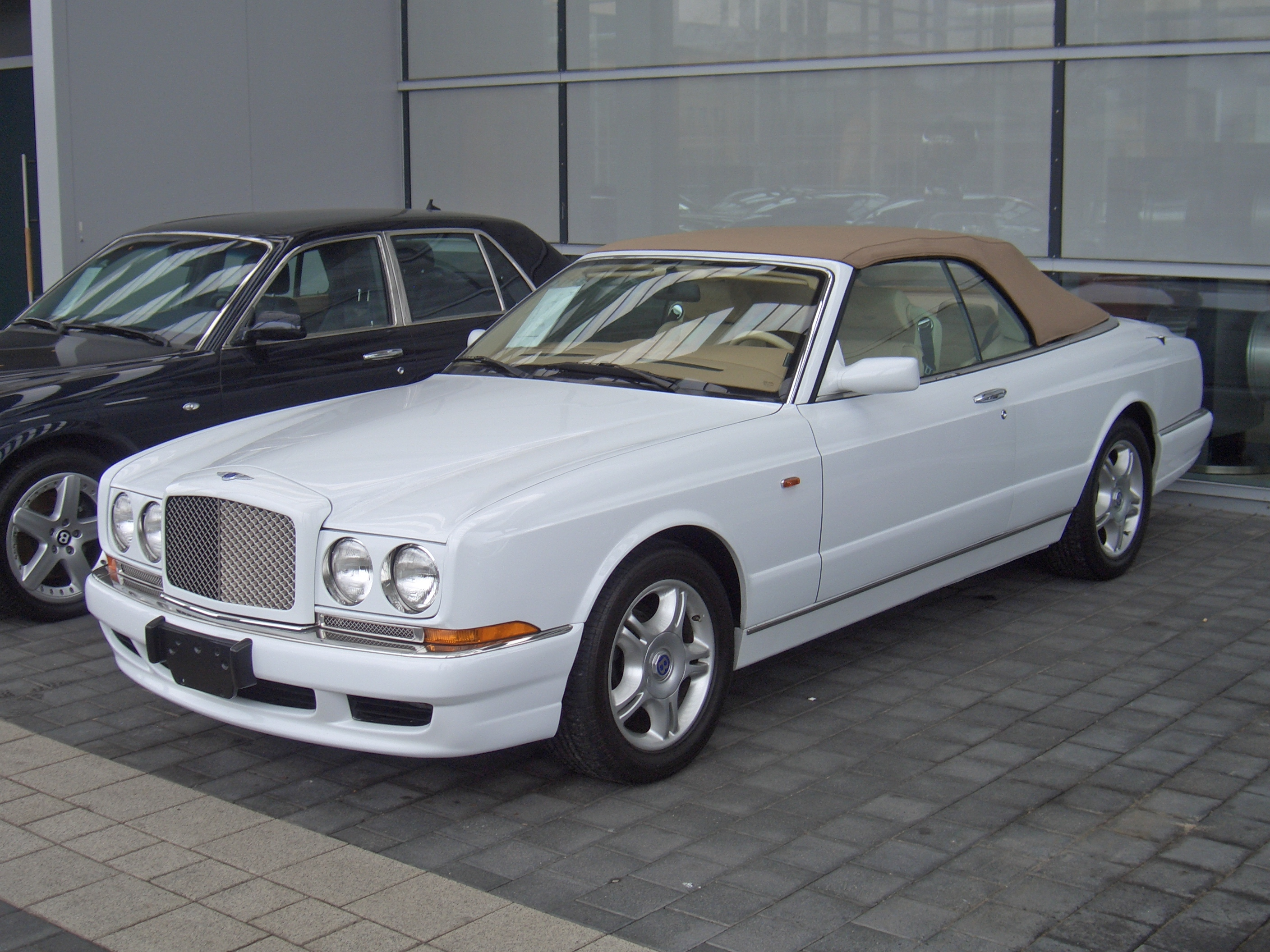 Bentley Azure (Continental R convertible), 1995-2003, 2002 model